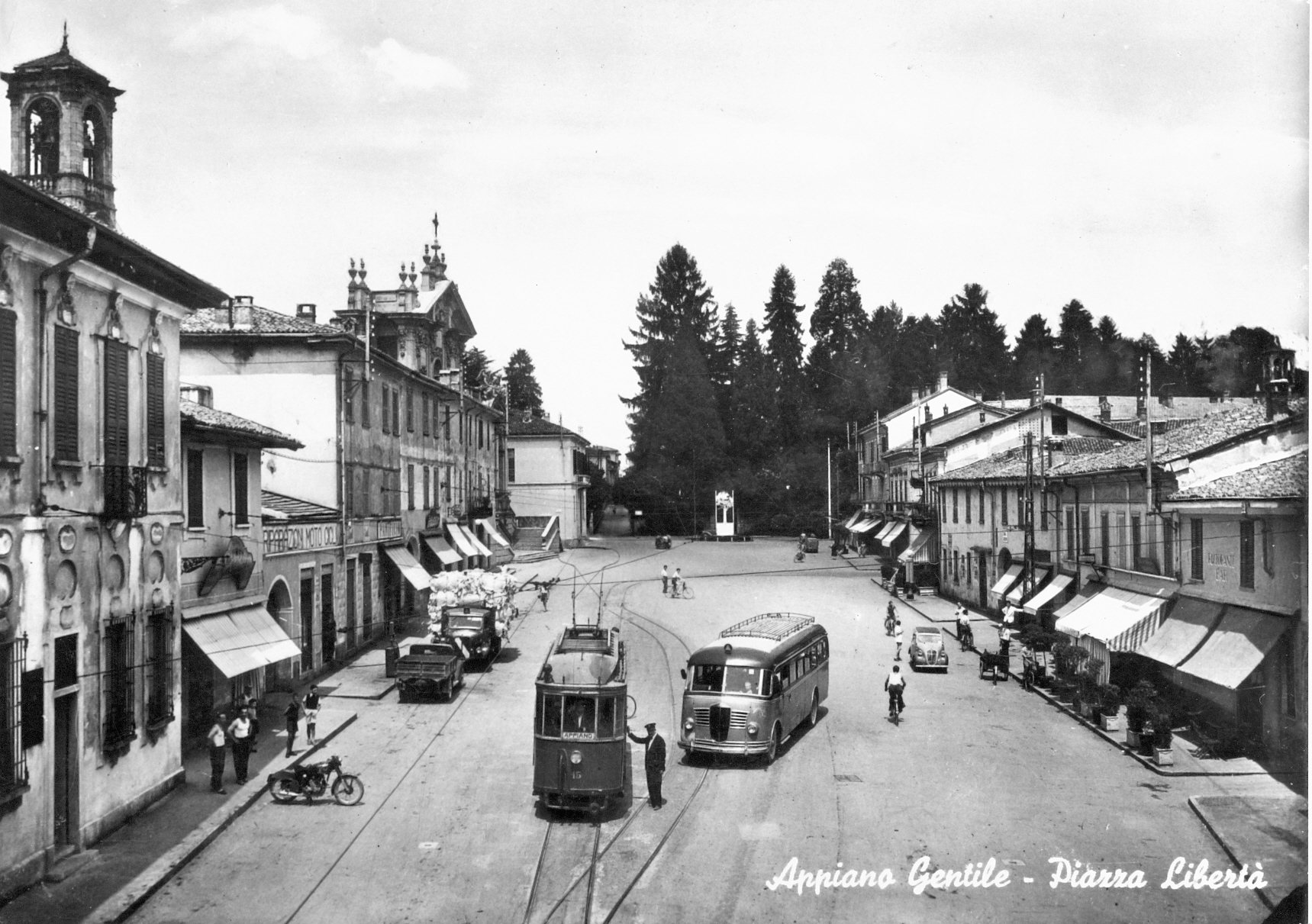 Vista di piazza Libertà ad Appiano Gentile; in sosta un tram della linea per Como